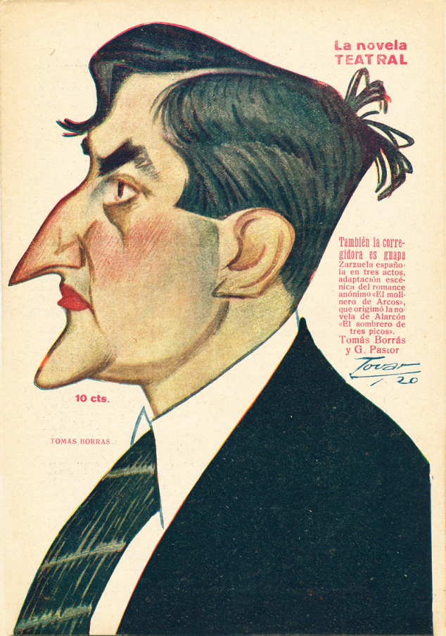 Caricatura de Tomás Borrás.